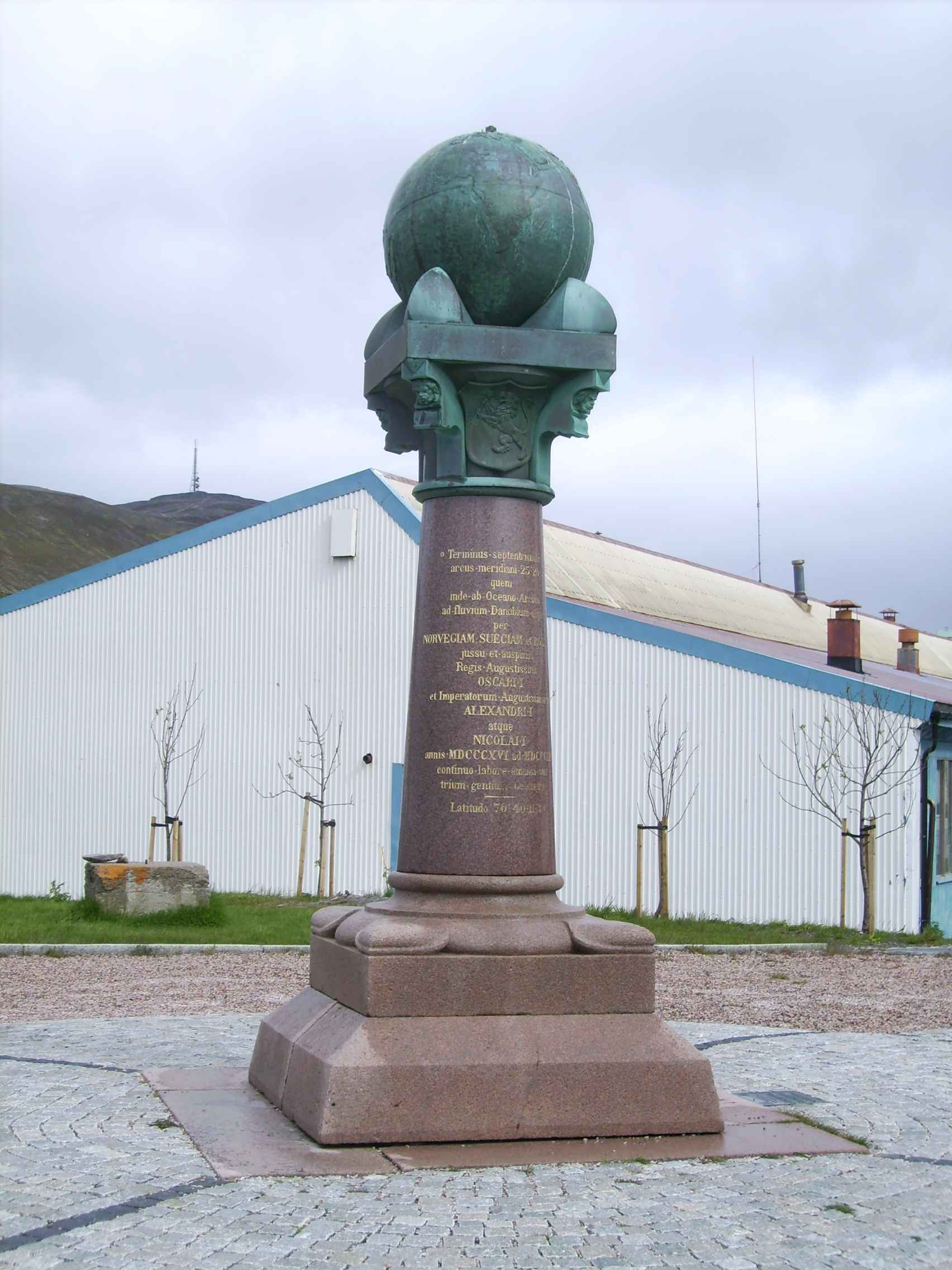 Triangulationspunkt in Hammerfest,Norwegen